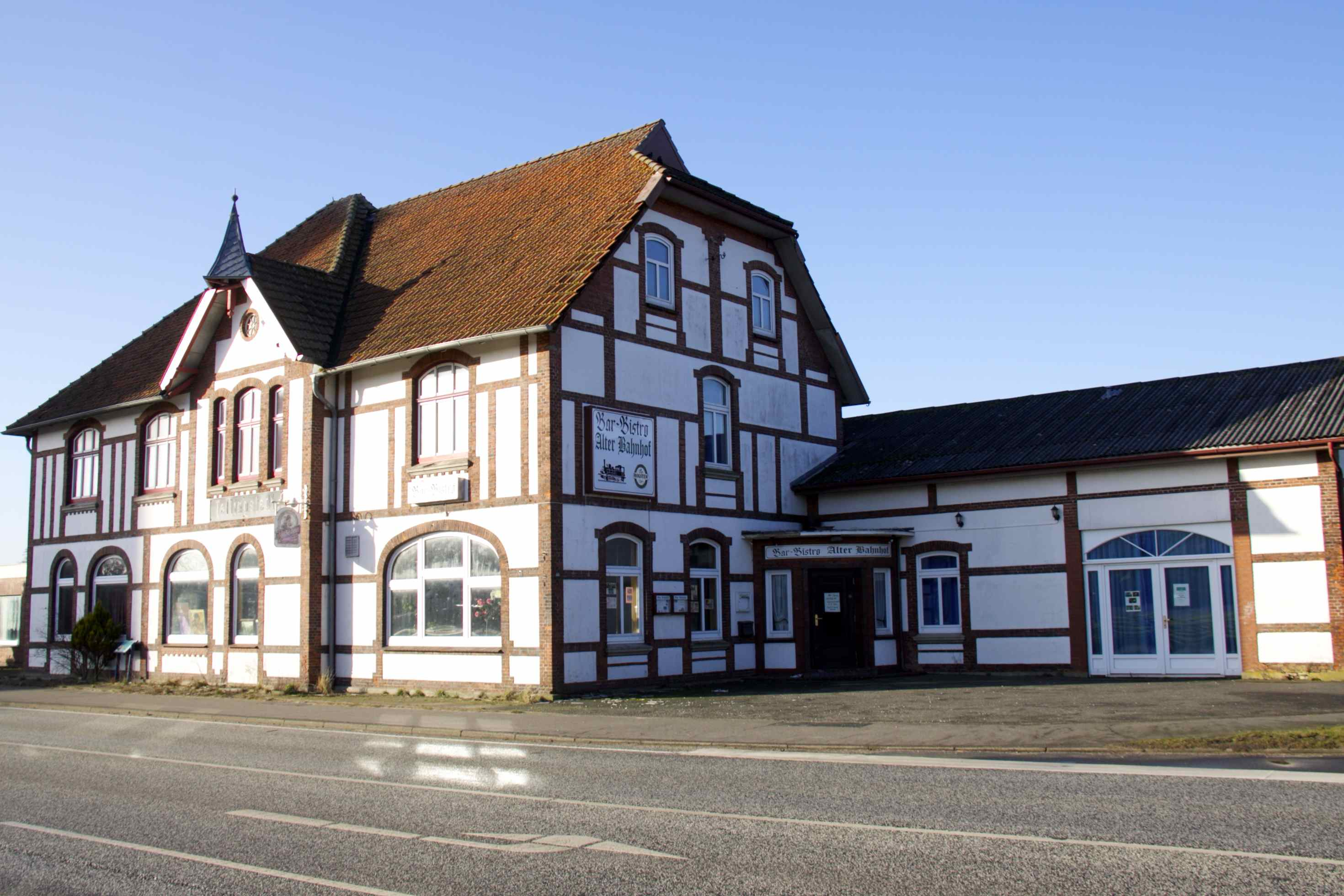 ehemaliger Bahnhof Tellingstedt